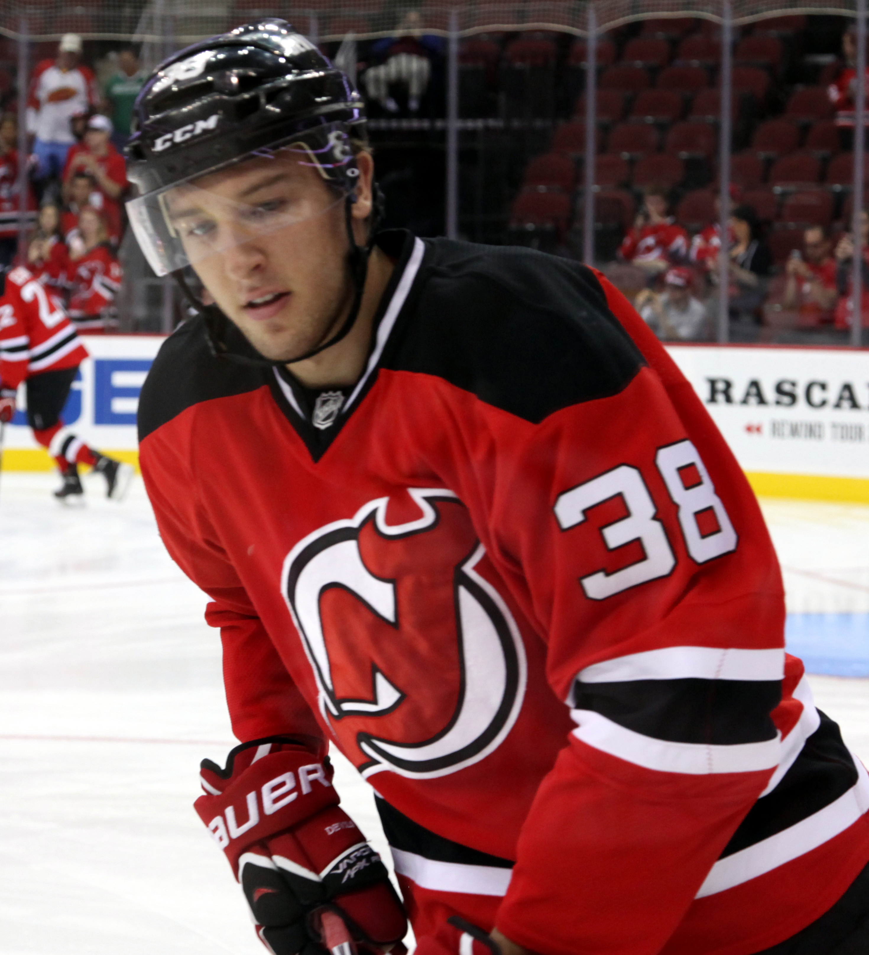 Matteau in September 2014.